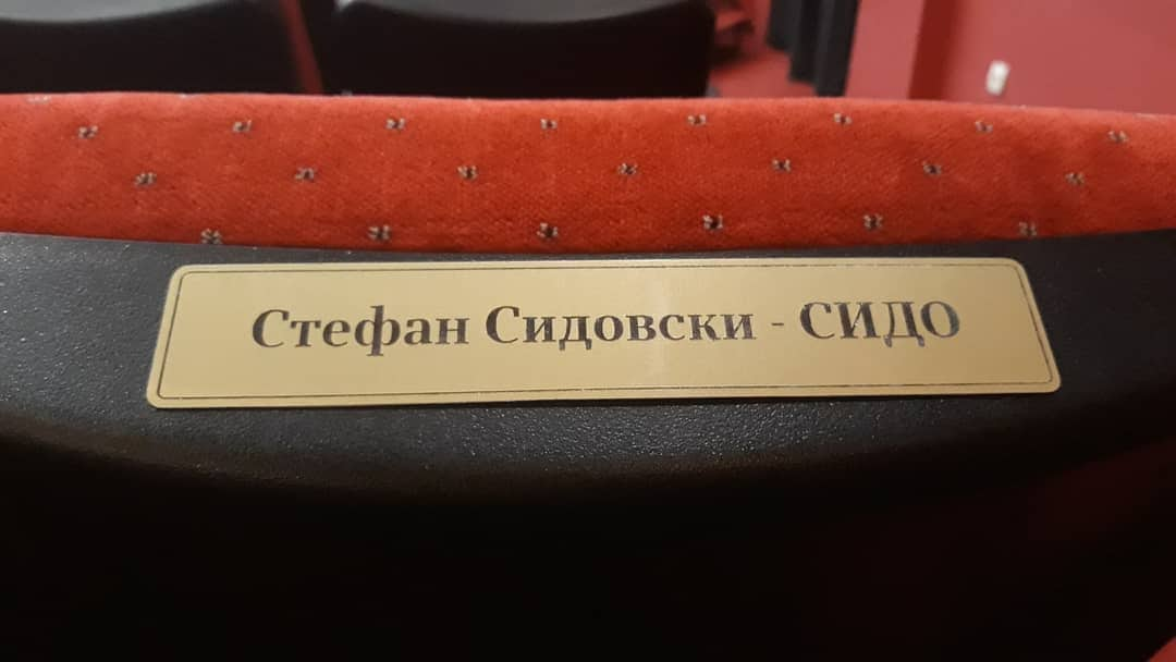 Плочка во чест на Стефан Сидовски во Кинотека на Република Македонија